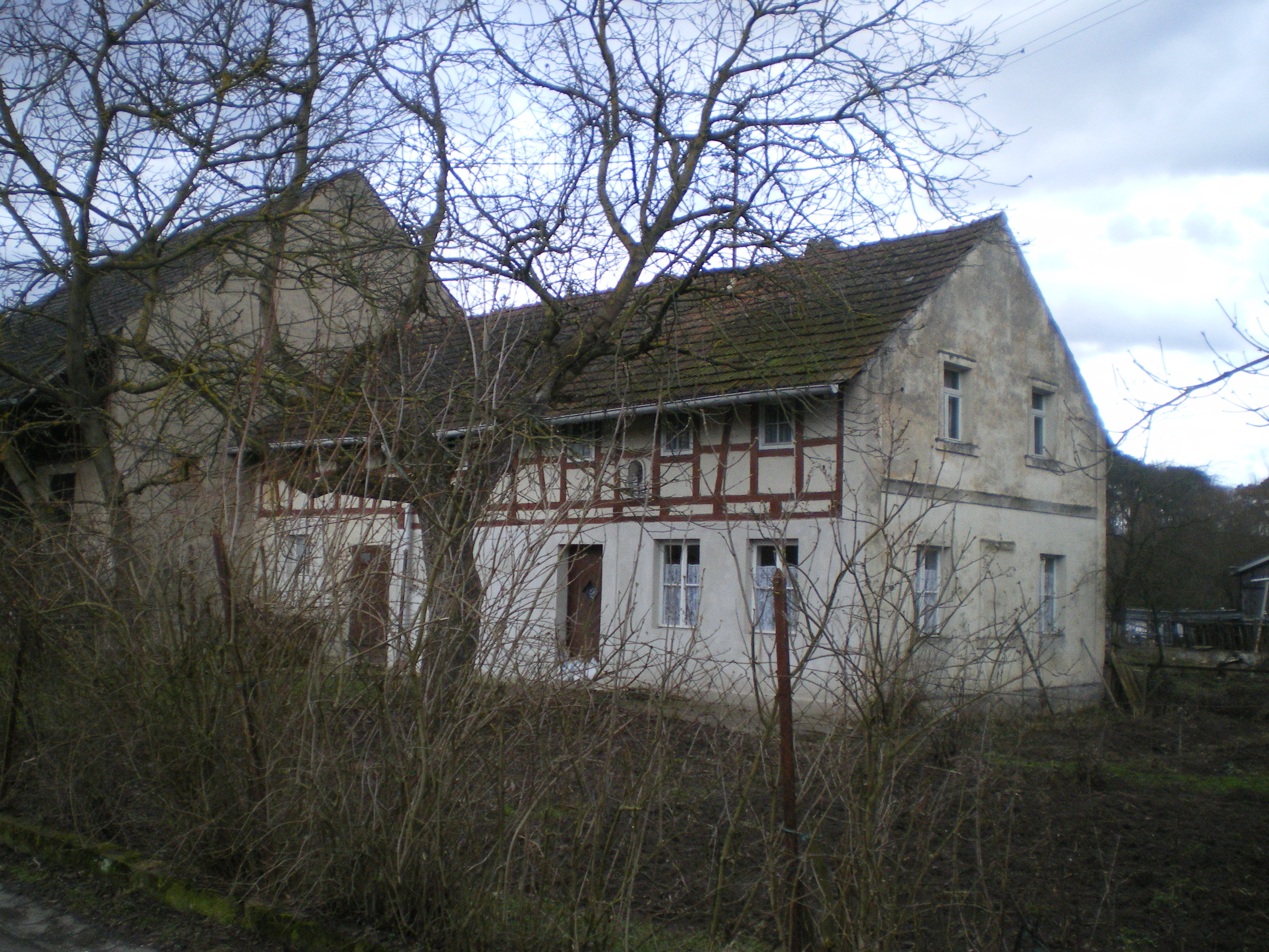 Bauernhof im Freudeneck